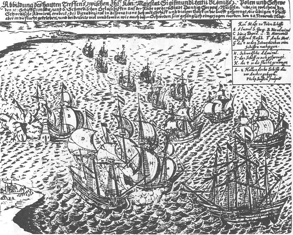 Druckgraphik der Seeschlacht vor Oliva 1627, Februar 1628 gefertigt